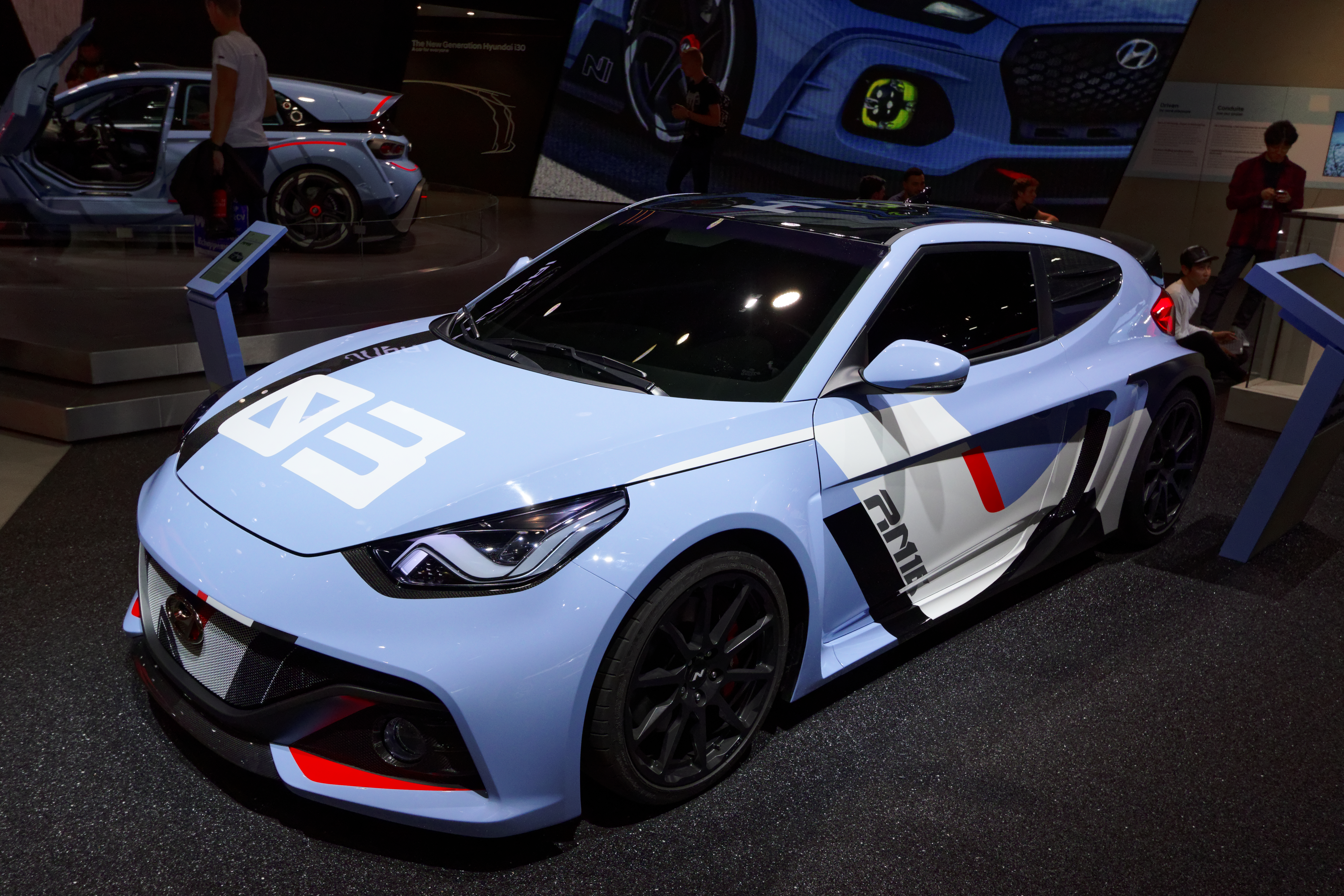 Une Hyundai RM16 présentée lors du mondial de l'automobile de Paris 2016.